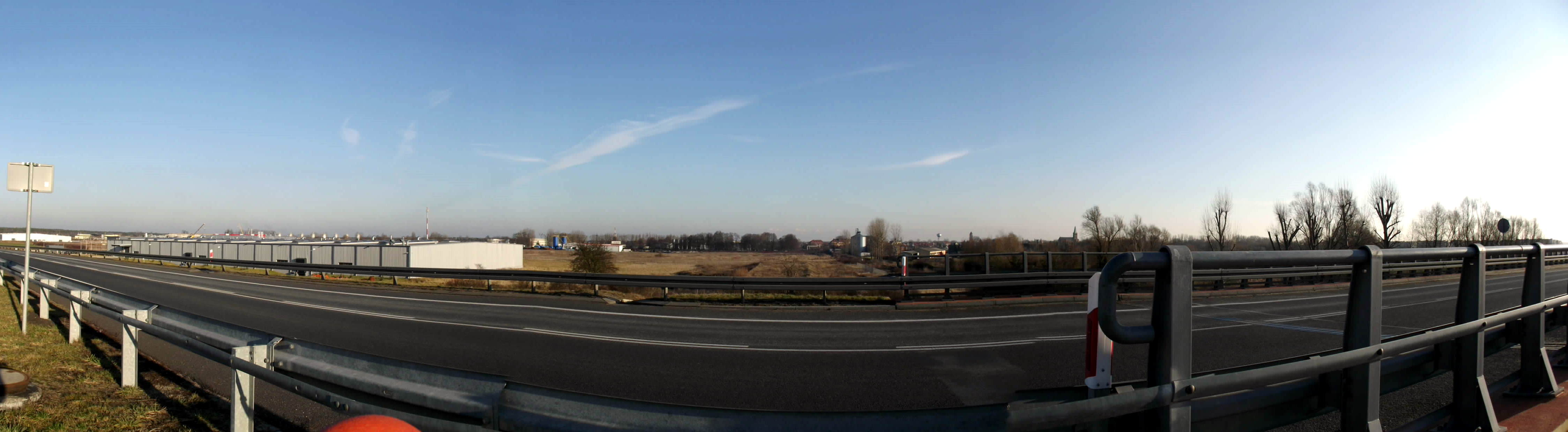 Panorama fragmentu przemysłowej części Międzyrzecza